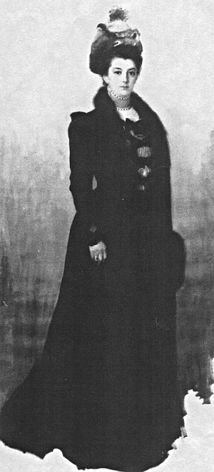 Портрет графини И.И.Шереметевой, урождённой Воронцовой-Дашковой.